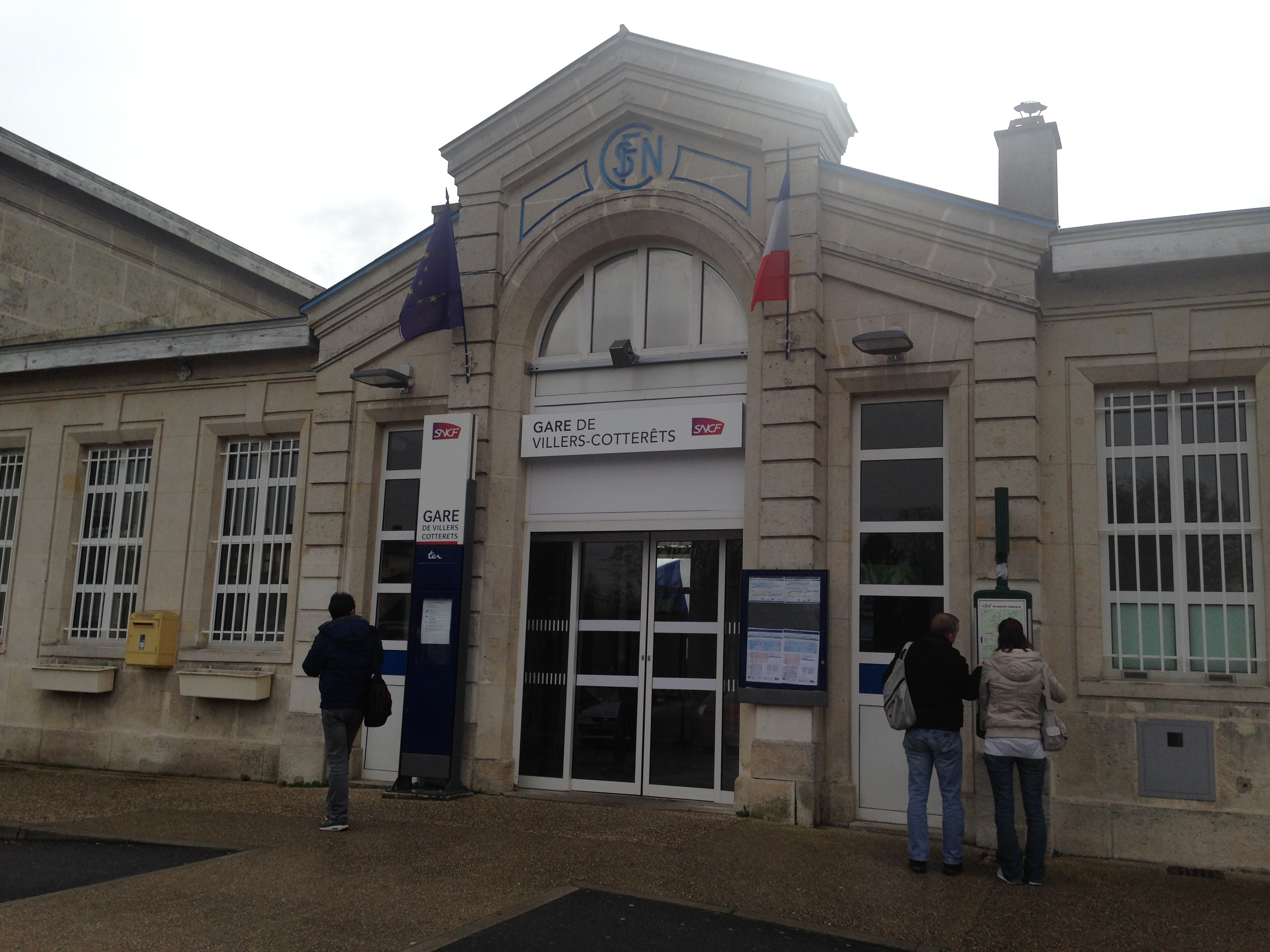 Gare de Villers-Cotterêts-2016